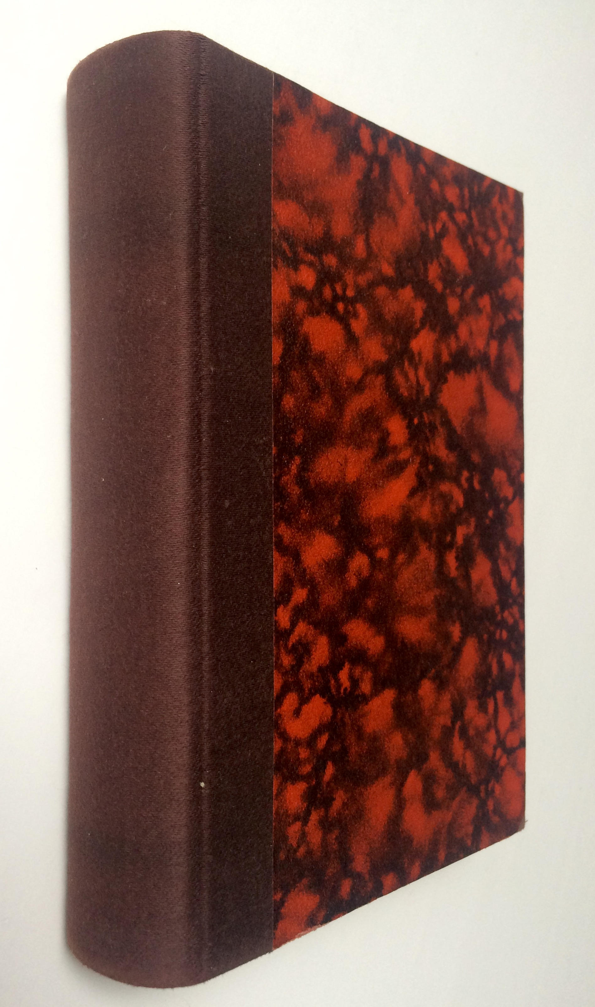 Raamatukoguköide